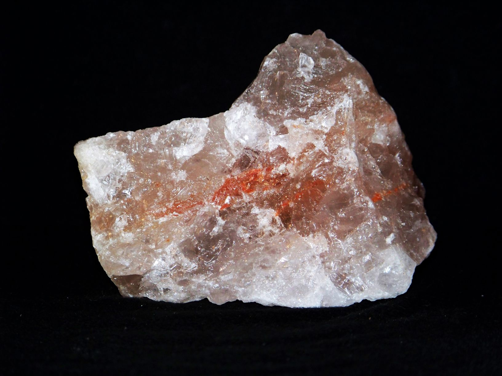 Halit zabarwiony hematytem, Kłodawa, Polska